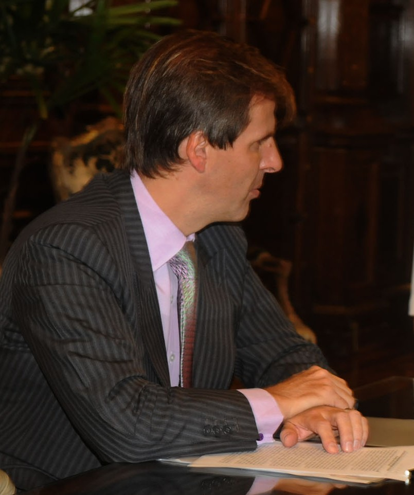 Martín Redrado. Foto oficial tomada en reunión con la presidenta Cristina Fernández.